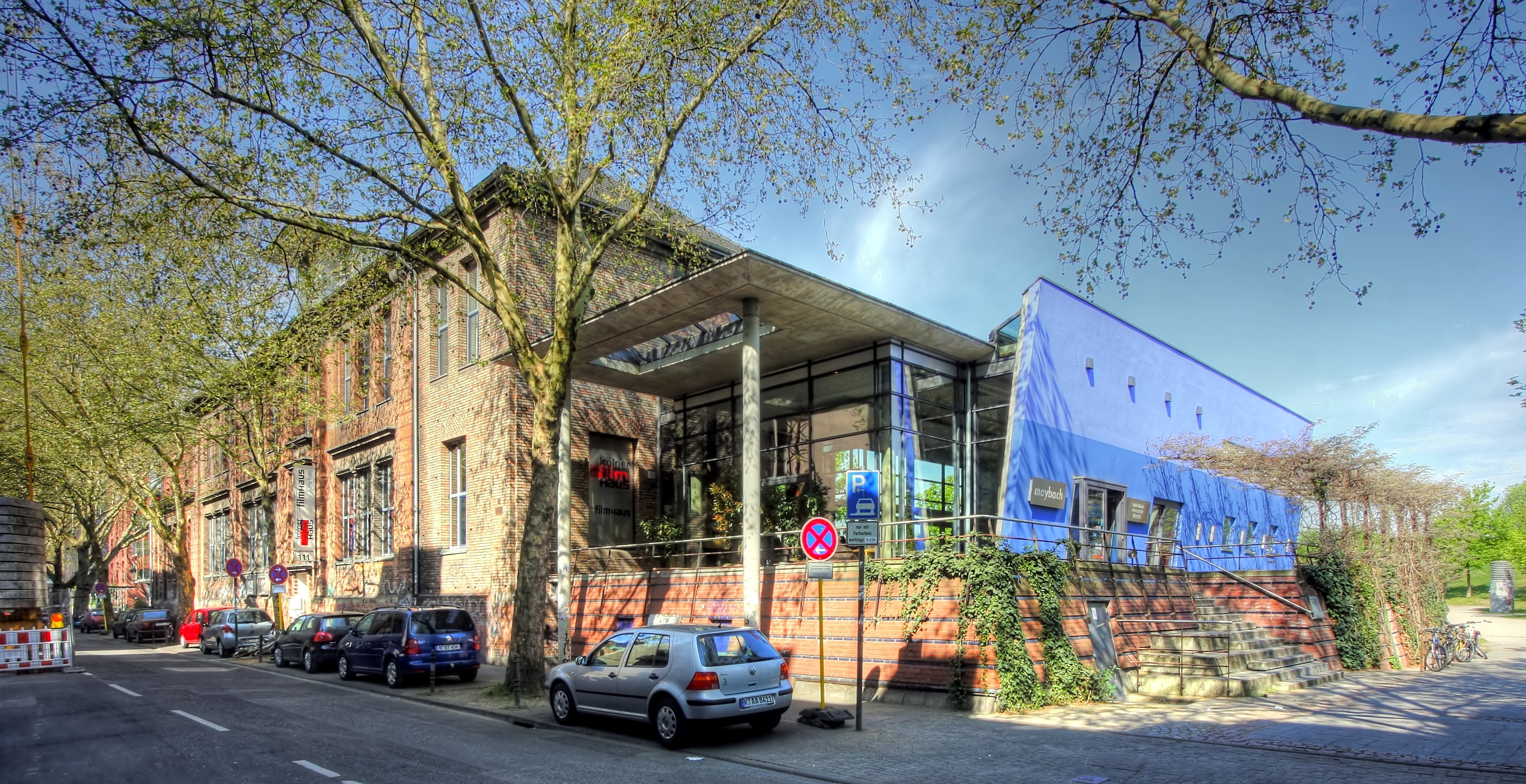 Filmhaus Köln, Maybachstraße 111, 50670 Köln